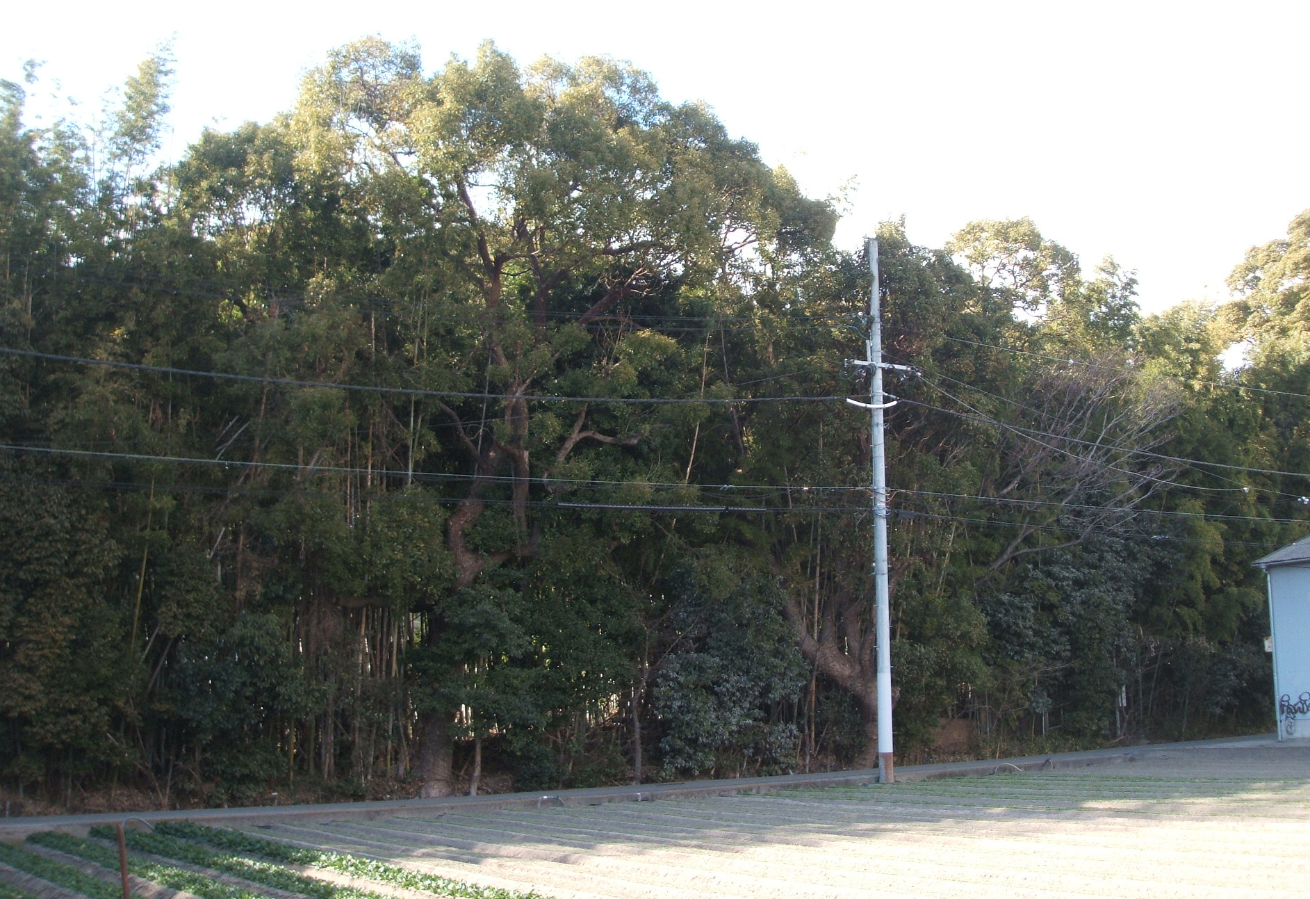 瓦林城跡の森